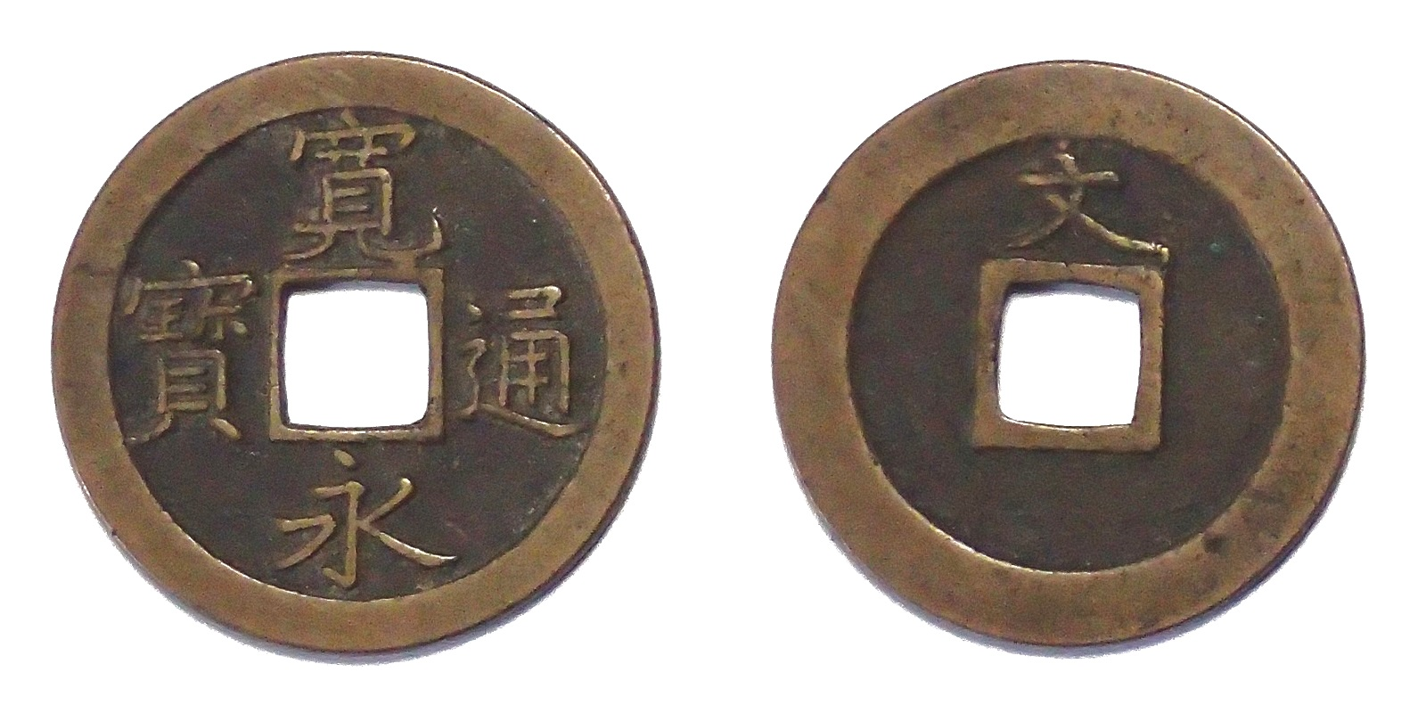 寛永通寳・亀戸銭, 文銭